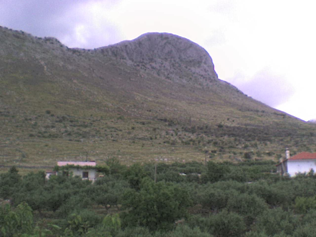 Η κορυφή του Αγίου Νίκωνα στο ομώνυμο χωριό της Δυτικής Μάνης